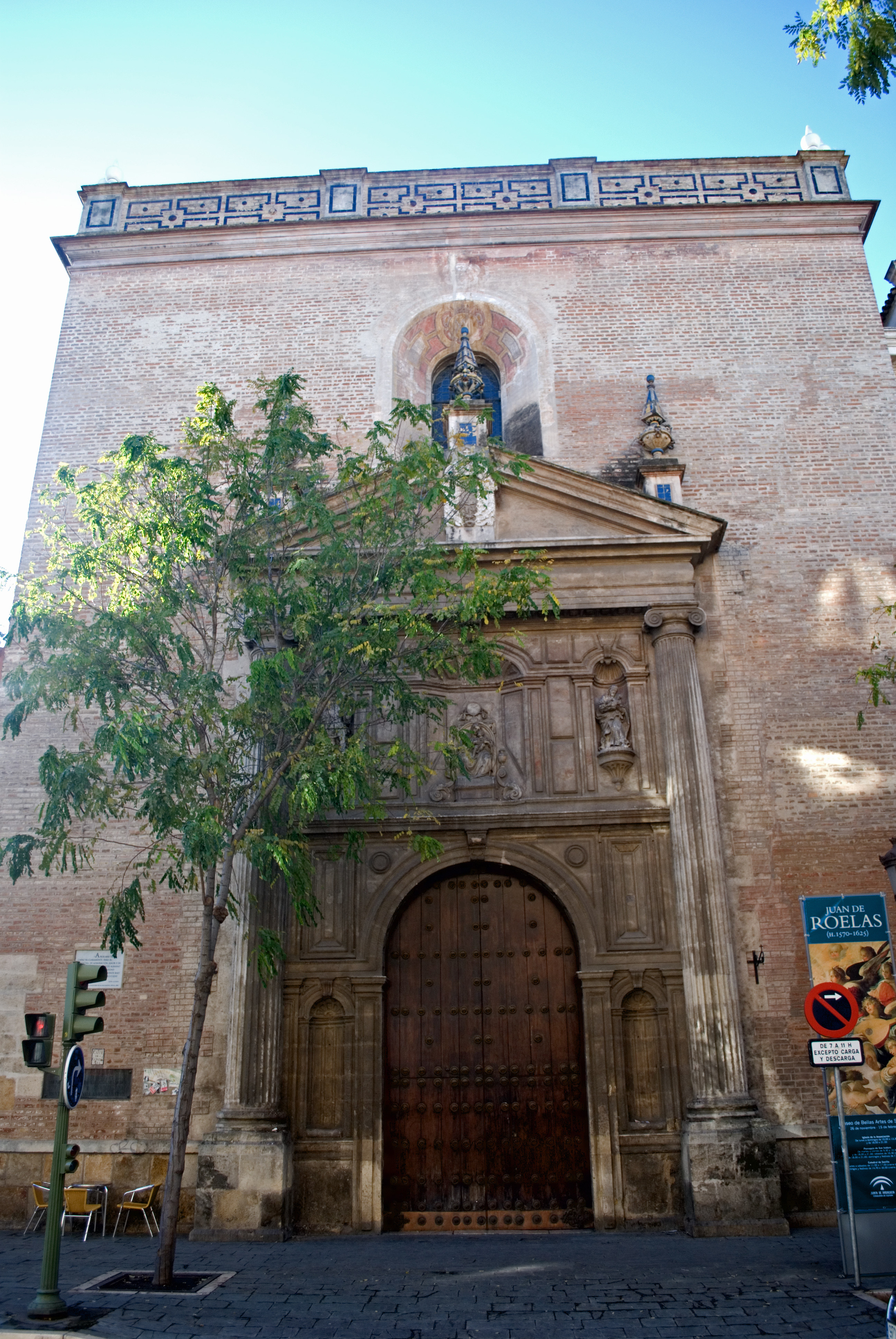 Fachada de la iglesia renacentista de la Anunciación, en Sevilla.